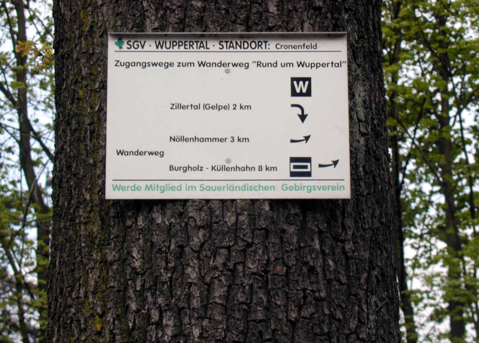 Wanderwege im Burgholz, Wuppertal 2001 selbst fotografiert